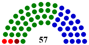 composicion de la Asamblea Legislativa en ese periodo.